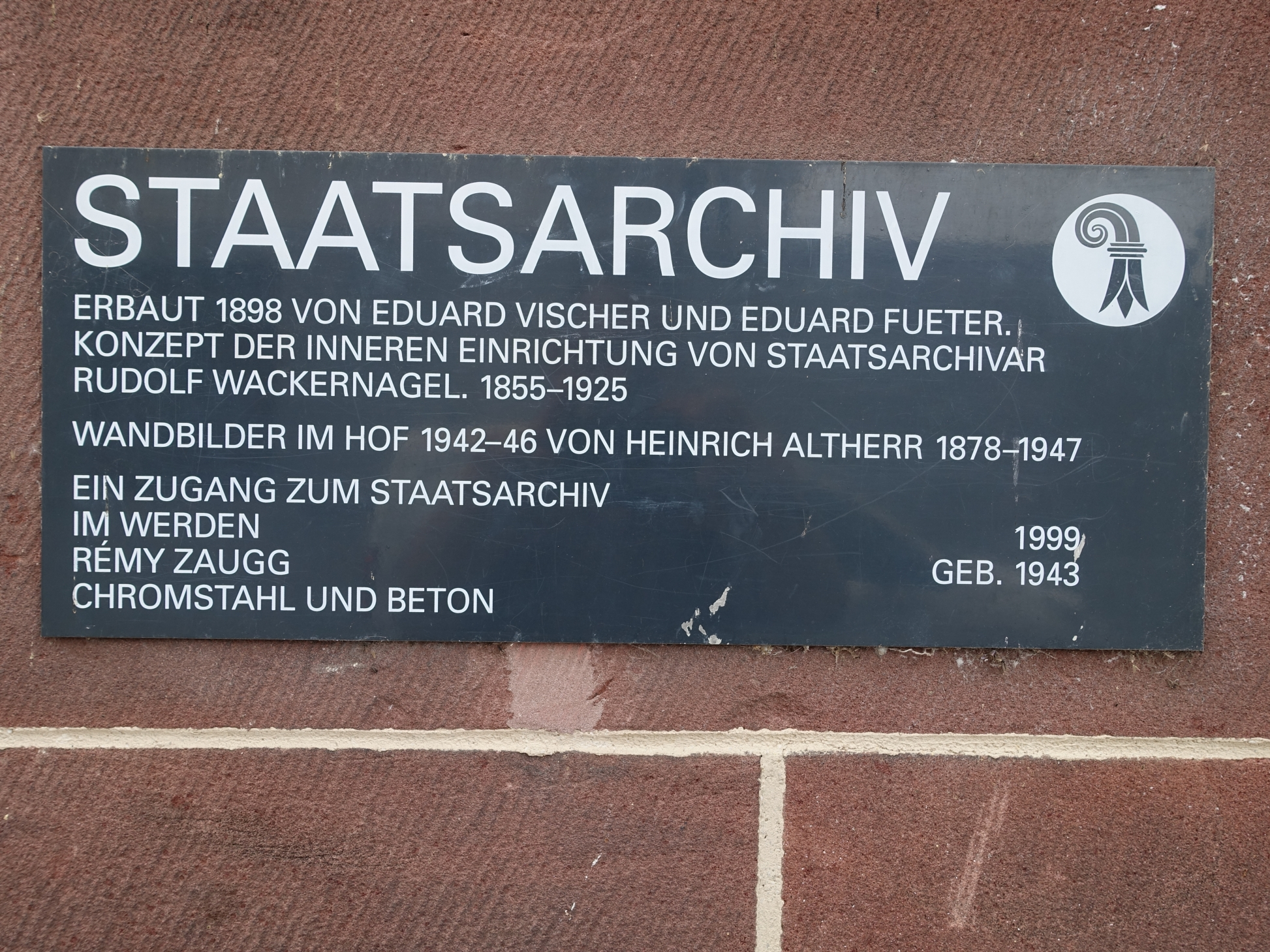 Staatsarchiv, Martinsgasse 2, Basel-Stadt. Erbaut 1898 von den Architekten Eduard Vischer und Rudolf Eduard Fueter. Konzept der inneren Einrichtung von Staatsarchivar Rudolf Wackernagel (1855–1925). Heinrich Altherr (1878–1947), Kunstmaler. Wandbilder von 1942–1946 im Kreuzgang